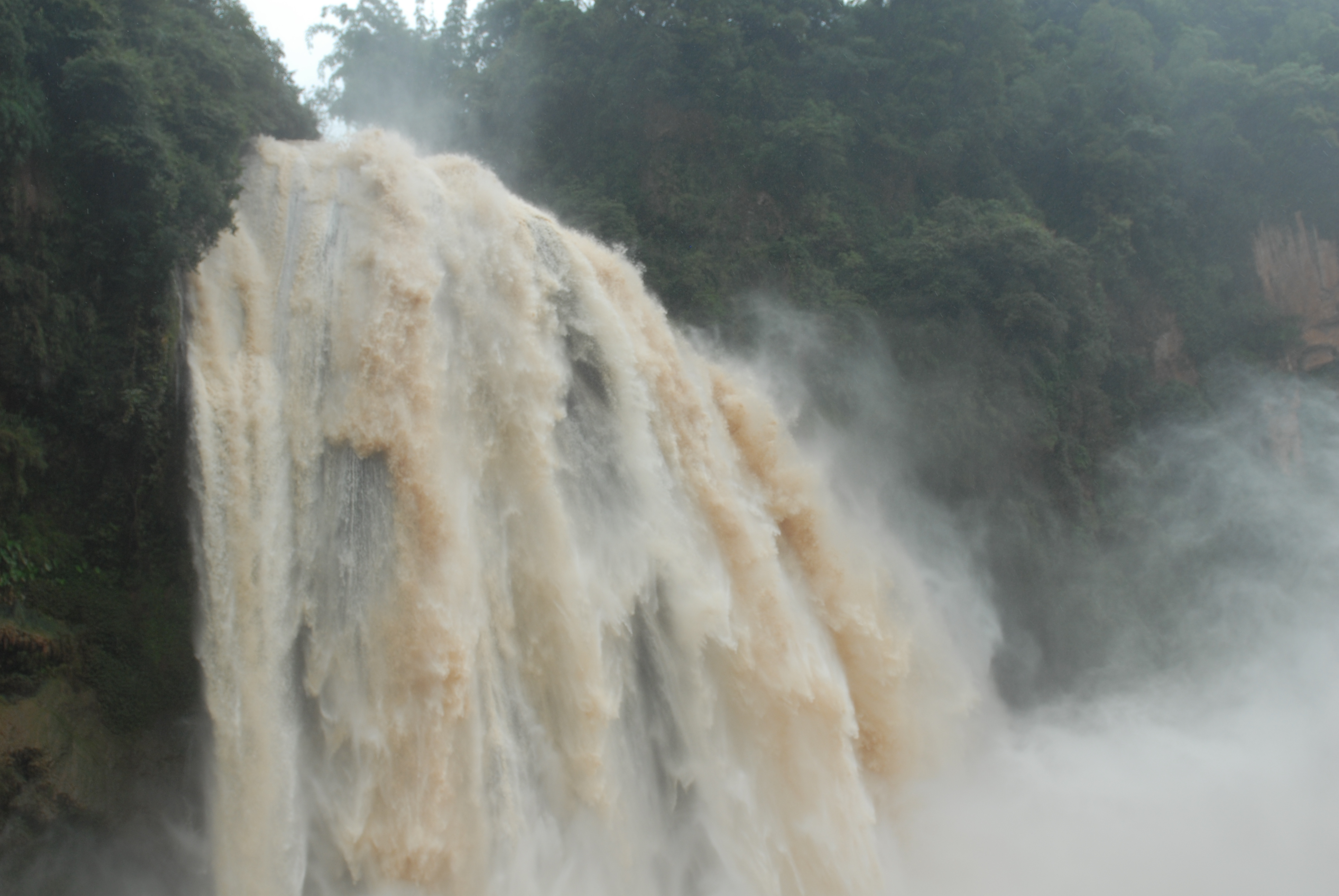 中文（中国大陆）: 云南石林大叠水瀑布